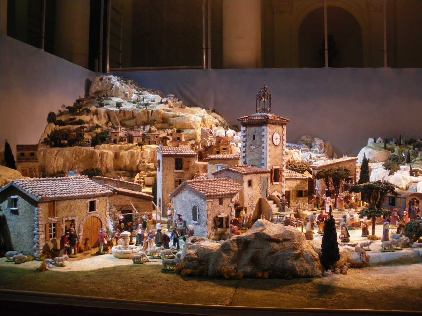 Crèche provencale, hall de la mairie d'Avignon, spécialement exécuté par les Ateliers Marcel Carbonel.